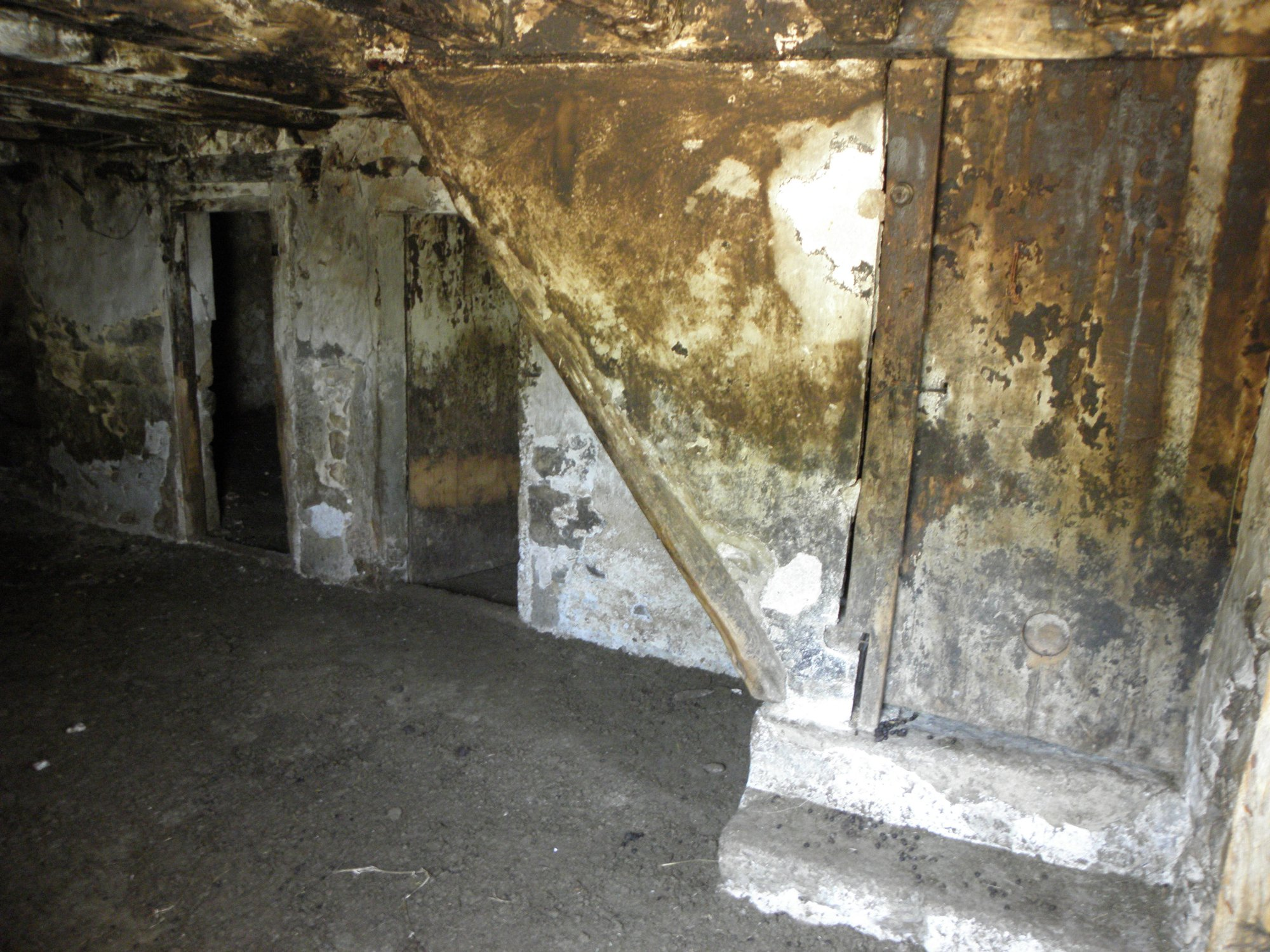 La masia de Cal Culrodó, al poble de la Coma (municipi de la Coma i la Pedra, Vall de Lord, Solsonès) L'interior de l'entrada de la façana del sud-oest, actualment emprada com a corral